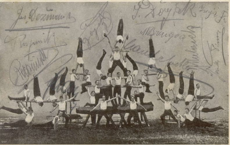 Prva javna telovadba 1908 društva Sokol leta 1908.